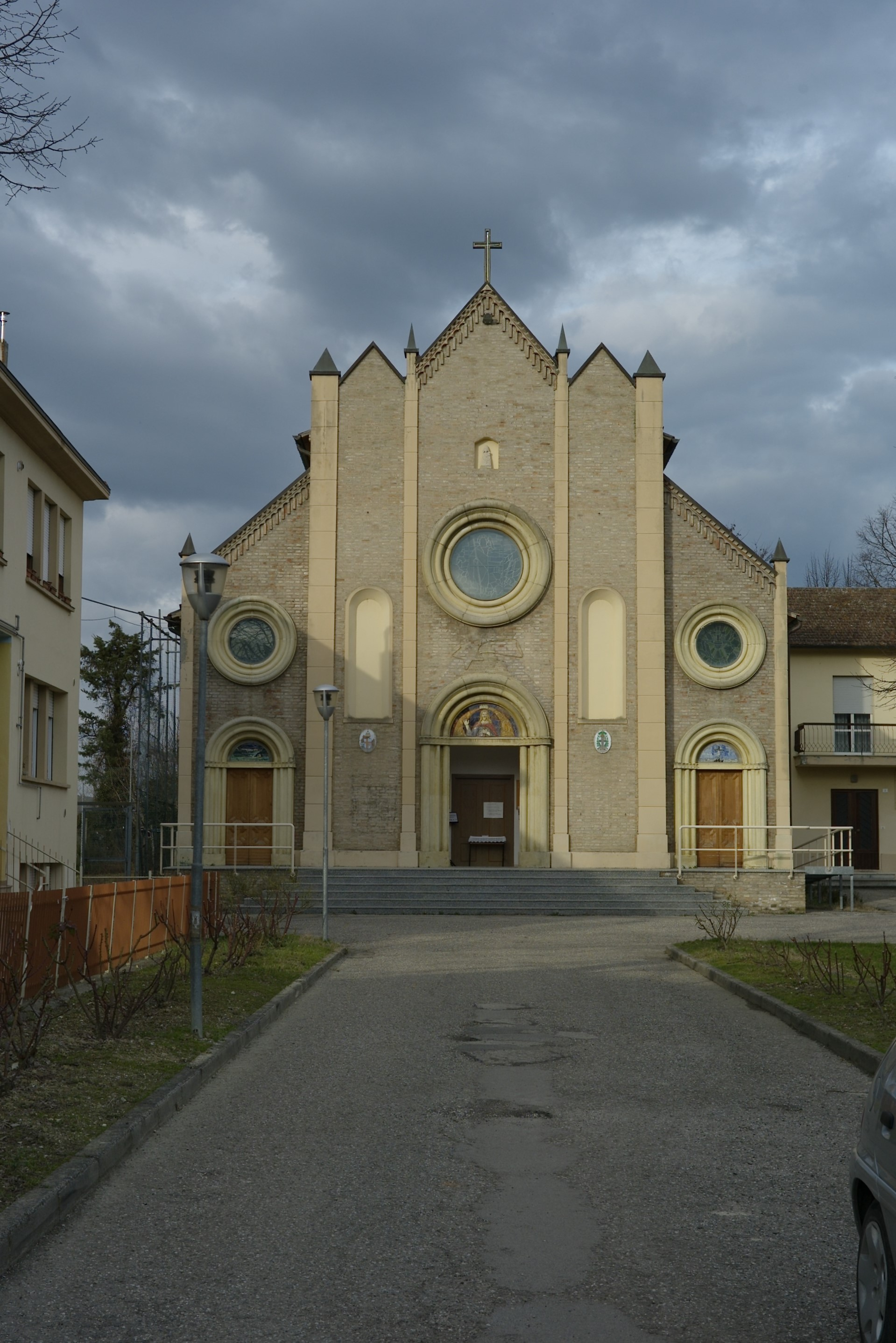 Veduta della facciata principale della chiesa parrocchiale del Cristo Re di Trasanni di Urbino